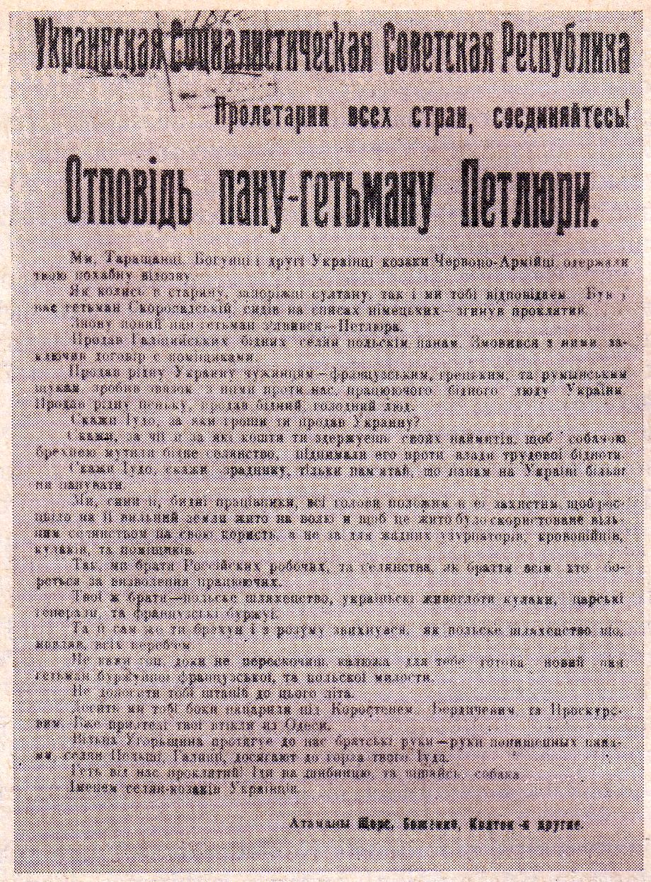 УССР. Отповедь Щорса и Боженко "пану-гетьману" Петлюре. 1919